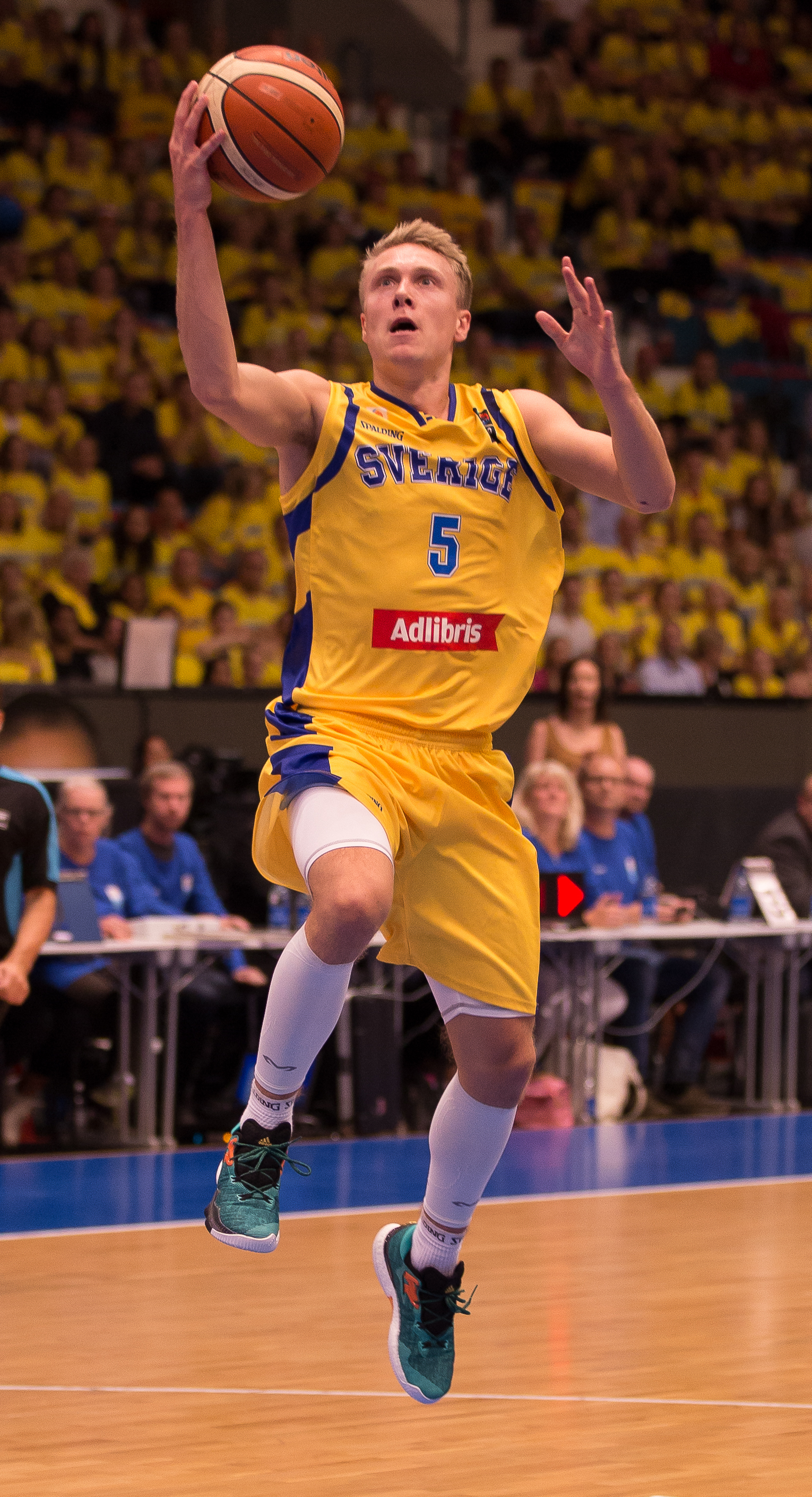 Tobias Borg lägger i två poäng mot Bosnien&Hercegovina inför 7120 personer på Hovet den 14 september 2016. Fotograf: Dennis Wiedermann